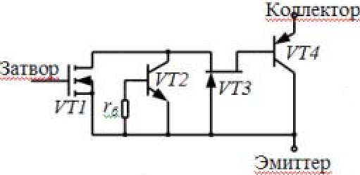 Еквівалентна схема IGBTтранзистора